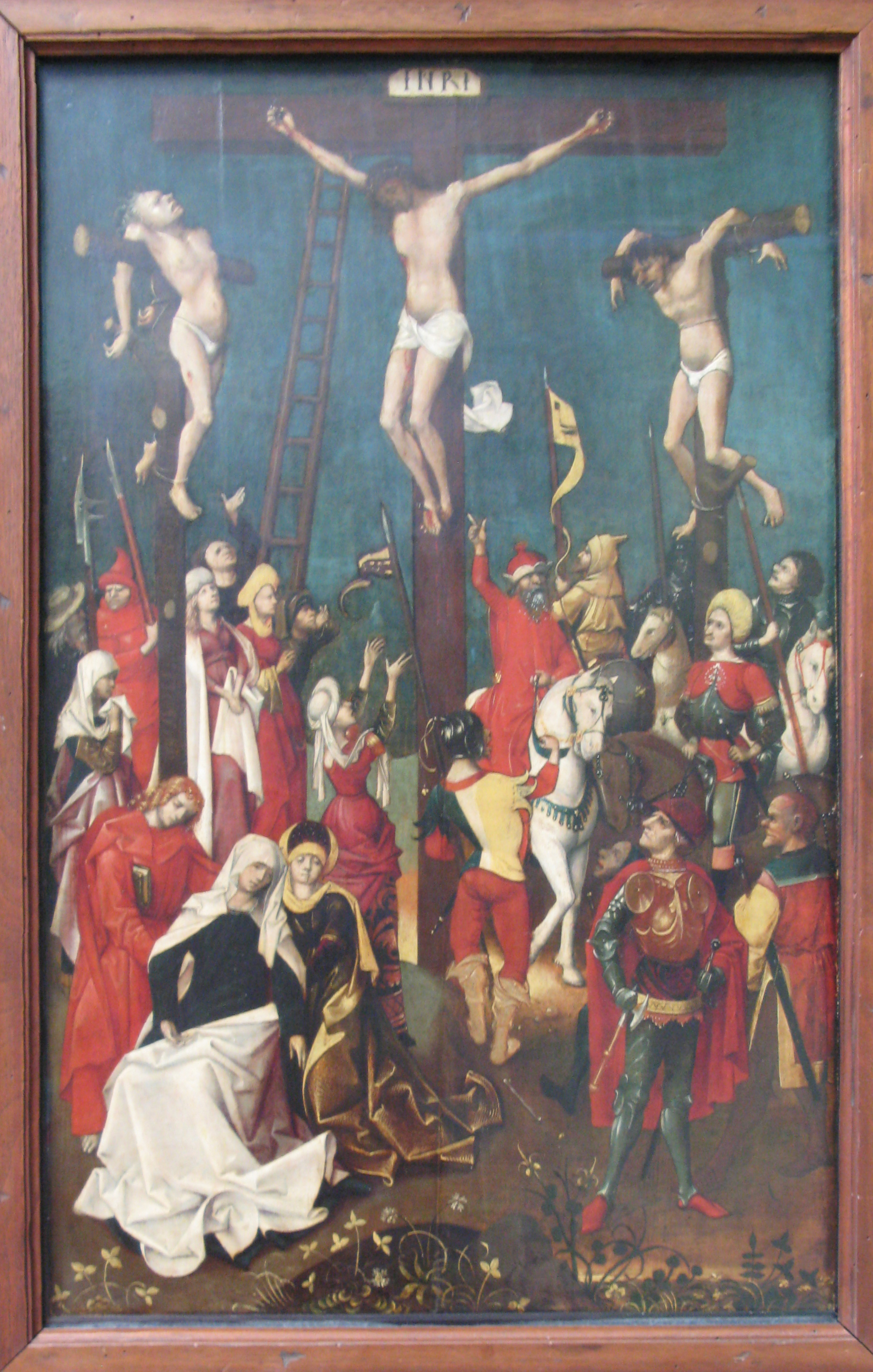 Crucifixion